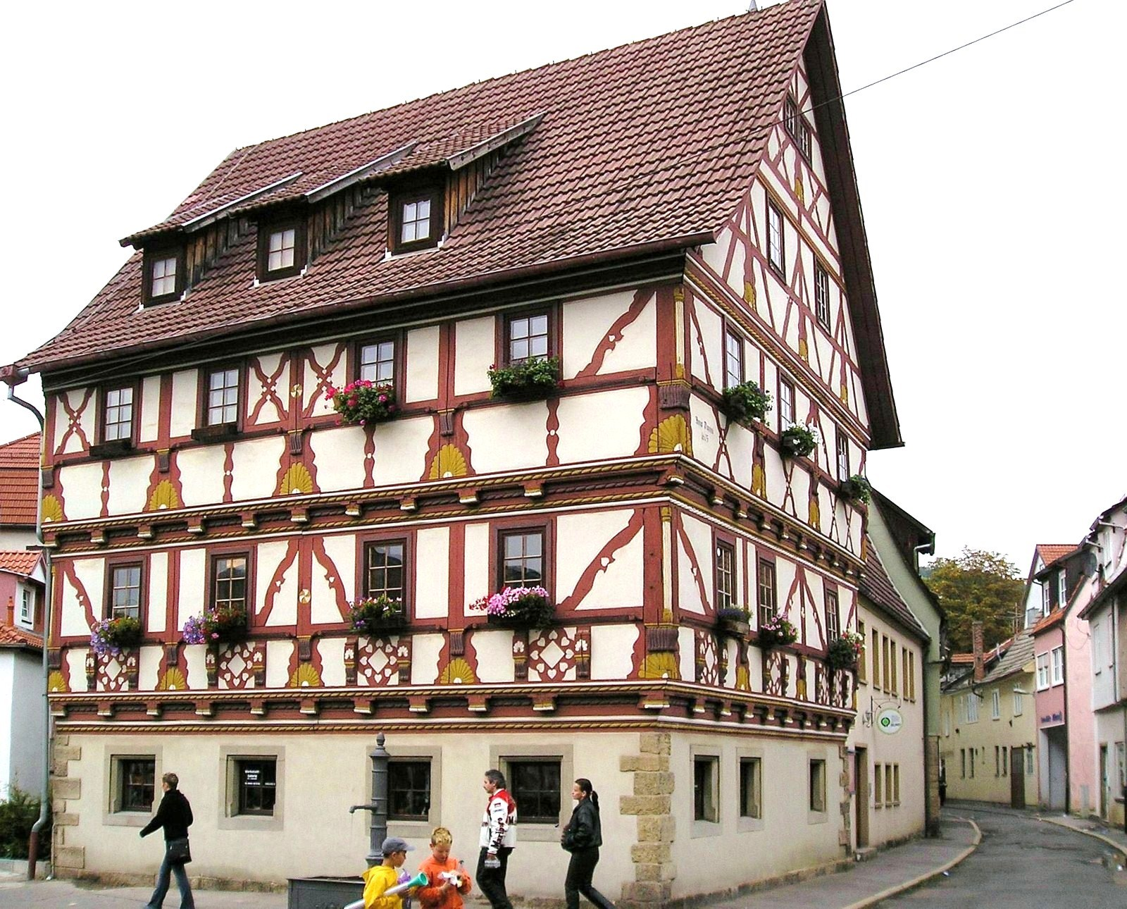 Typisches Henneberg-Fränkisches Fachwerkhaus in Meiningen, reich verziert mit Andreaskreuzen und Sonnenscheiben, erbaut um 1600, genannt Hartungsches Haus, Wintergasse 8